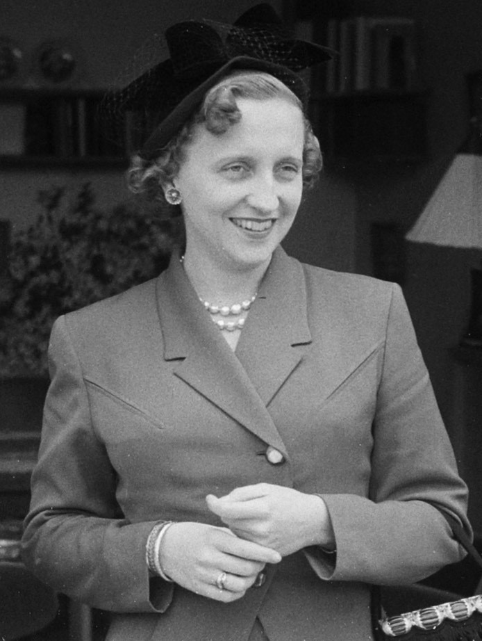 Bezoek Margaret Truman [dochter van de Amerikaanse president en zangeres] aan Soestdijk.